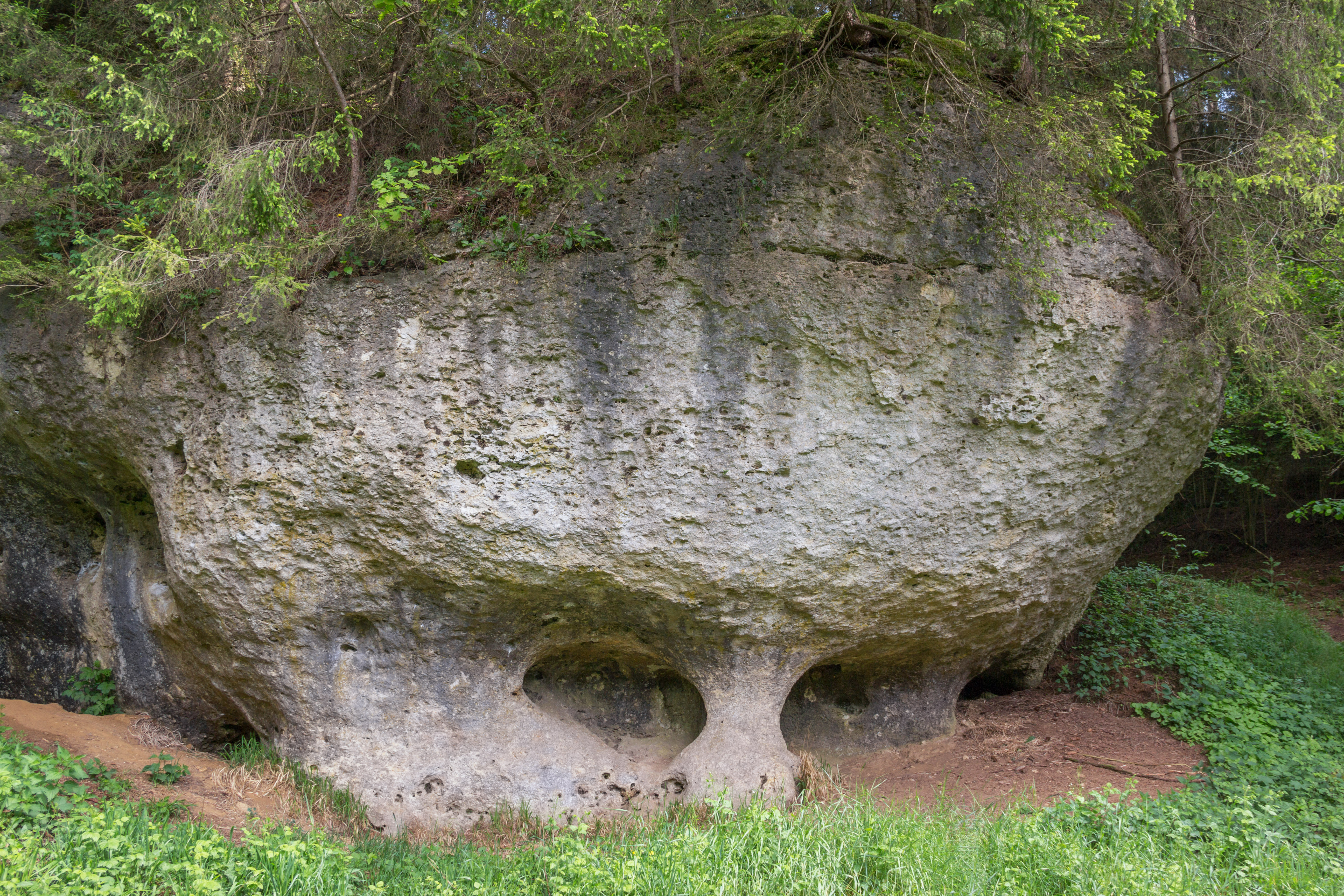 Felsen am Speckbach, Geotop, Naturpark Fränkische Schweiz-Veldensteiner Forst